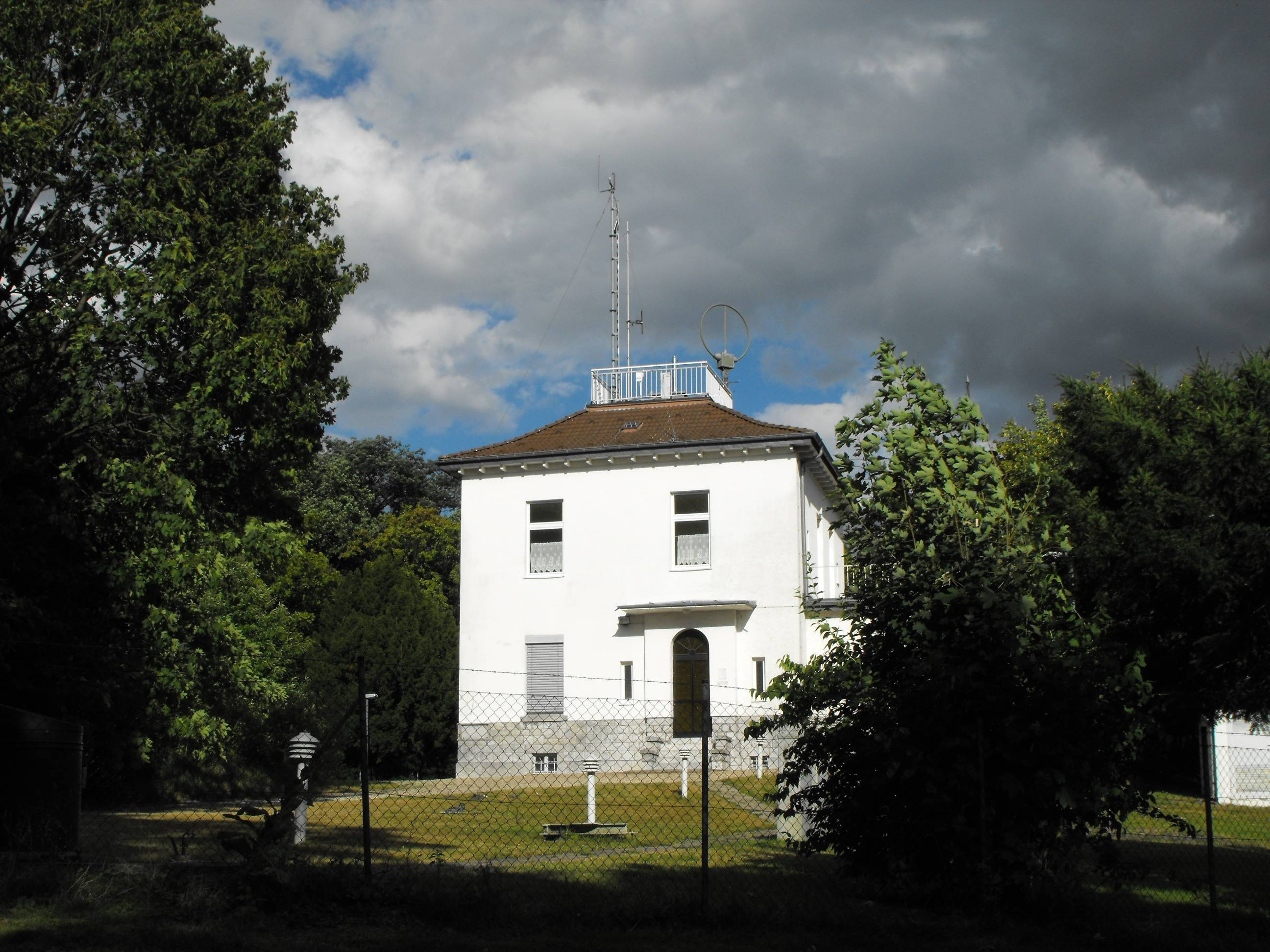 Wetterwarte (ehemalige meteorologische Station) Aachen im StadtgartenThis is a photograph of an architectural monument., no. 0